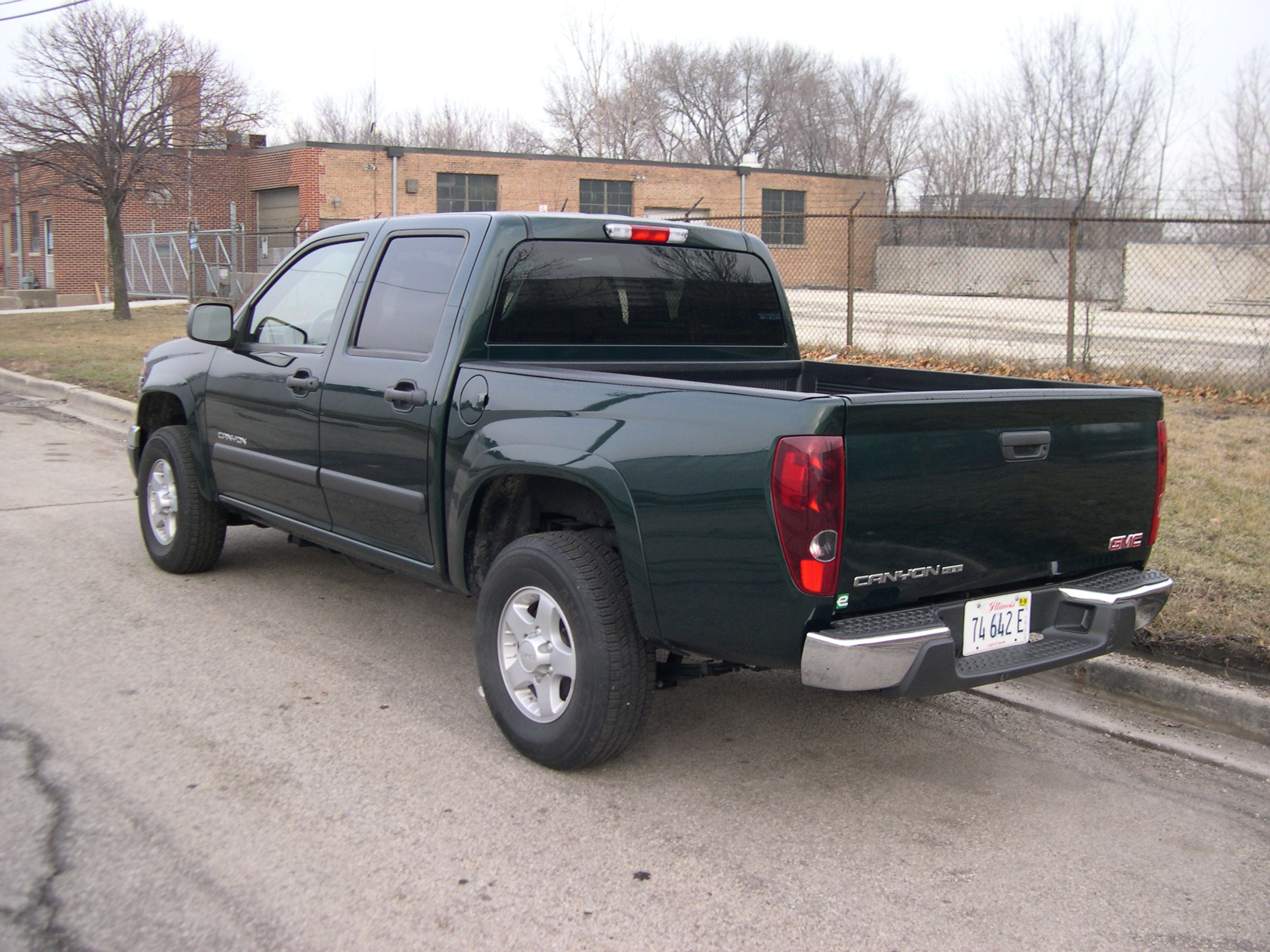 GMC Canyon